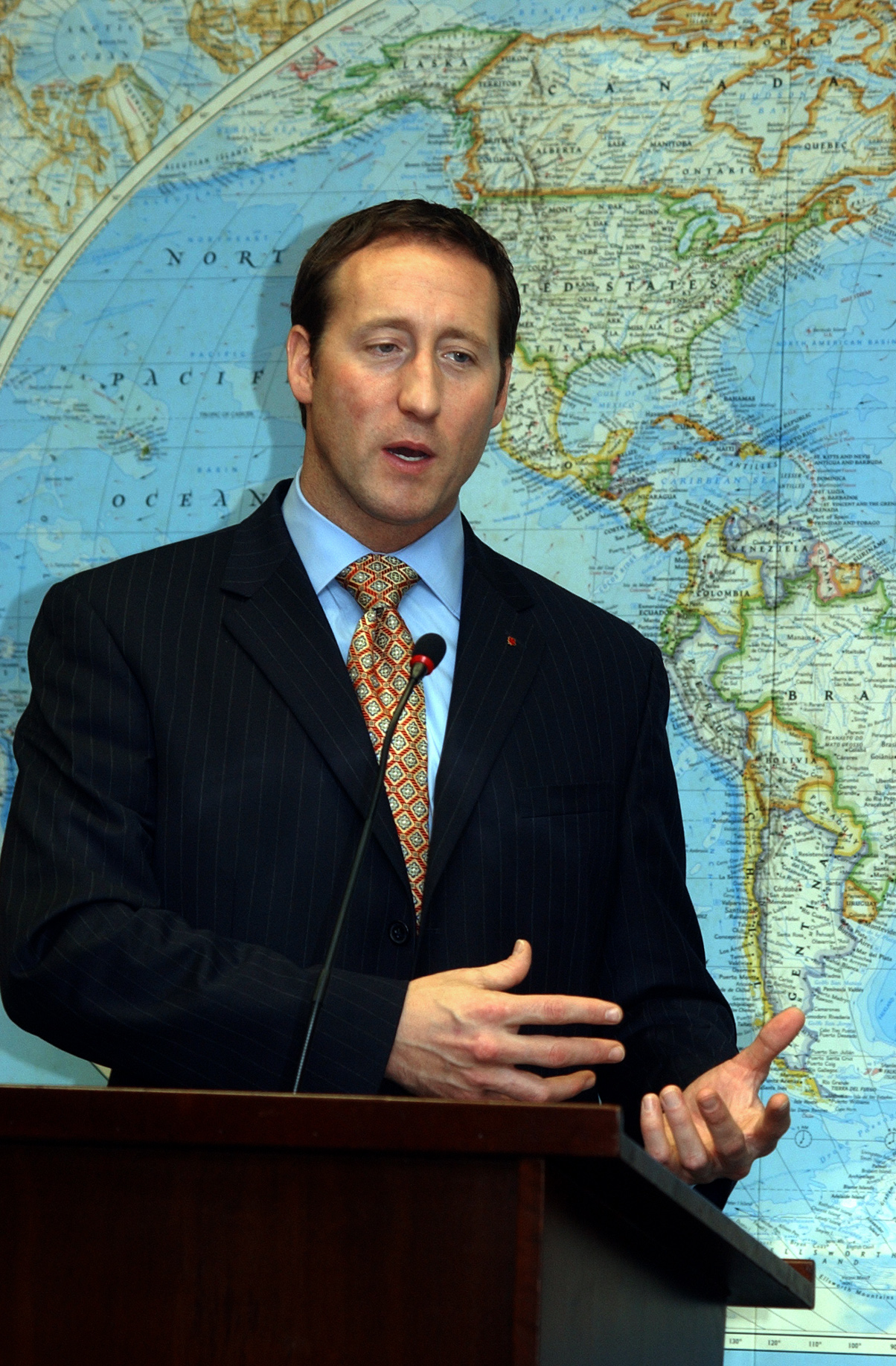 O ministro das Negócios Estrangeiros do Canadá, Peter MacKay, em Brasília.